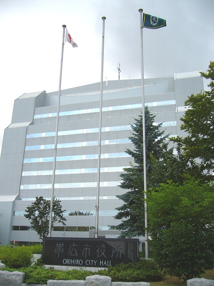 Obihiro City Hall in Hokkaido, Japan